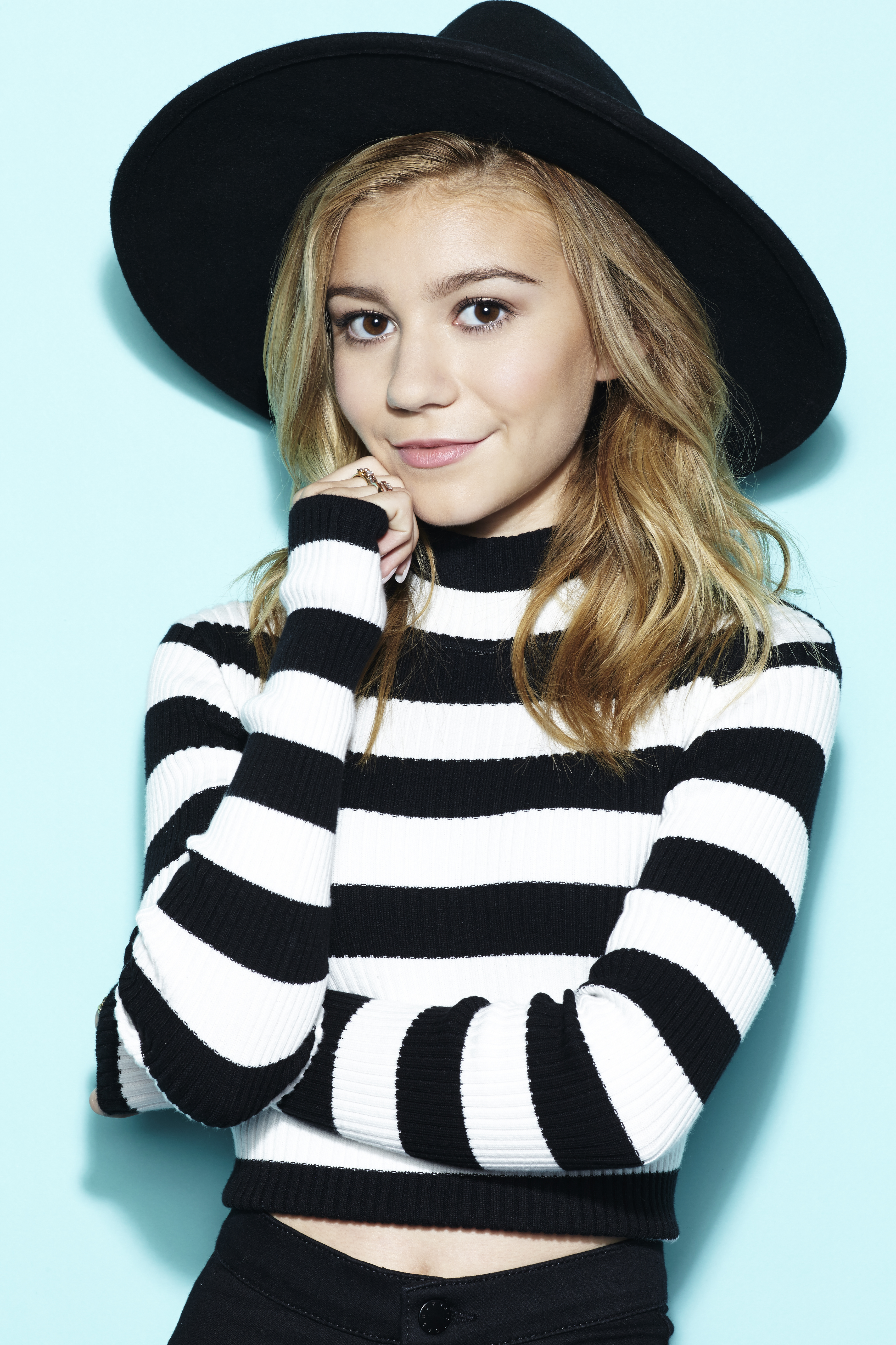 G Hannelius